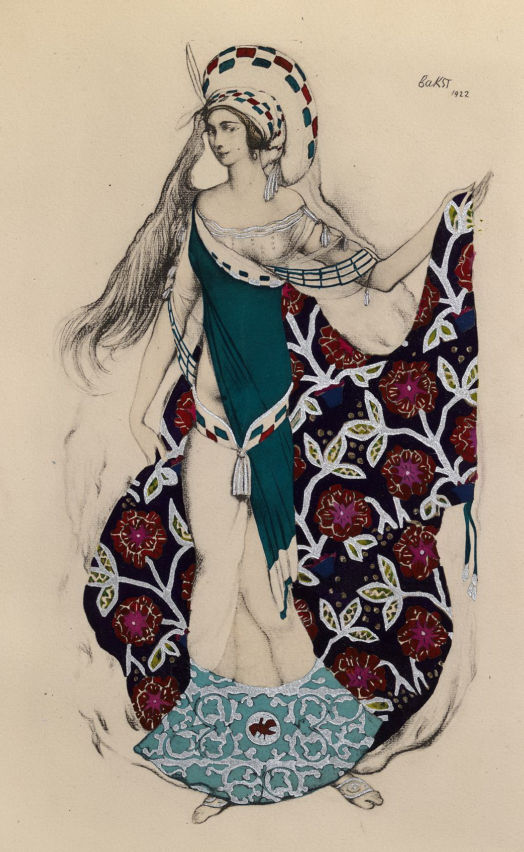 Эскиз костюма танцовщицы, держащей шлейф своего платья, к балету Поля Паре *Смущенная Артемида*. 1922